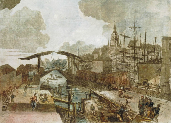 Utsikt mot Slussen, med Södermalm och Saltsjön i bakgrunden. Akvarellerad konturetsning av Elias Martins skola, från 1790-talet.